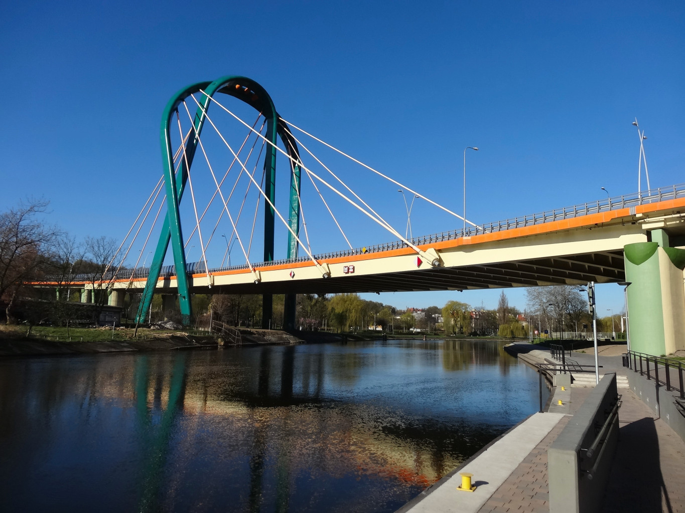 Trasa Uniwersytecka w Bydgoszczy, most wantowy nad Brdą